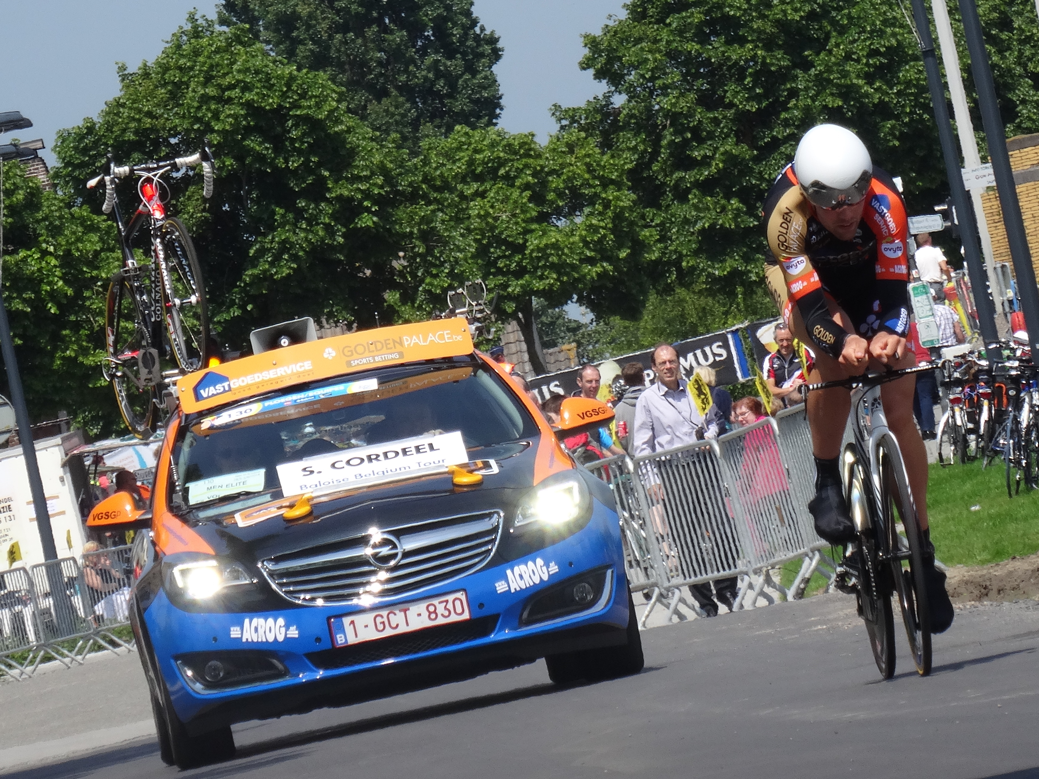 Reportage photographique réalisé le vendredi 30 mai à l'occasion du contre-la-montre individuel de la troisième étape du Tour de Belgique 2014 à Dixmude, Belgique.